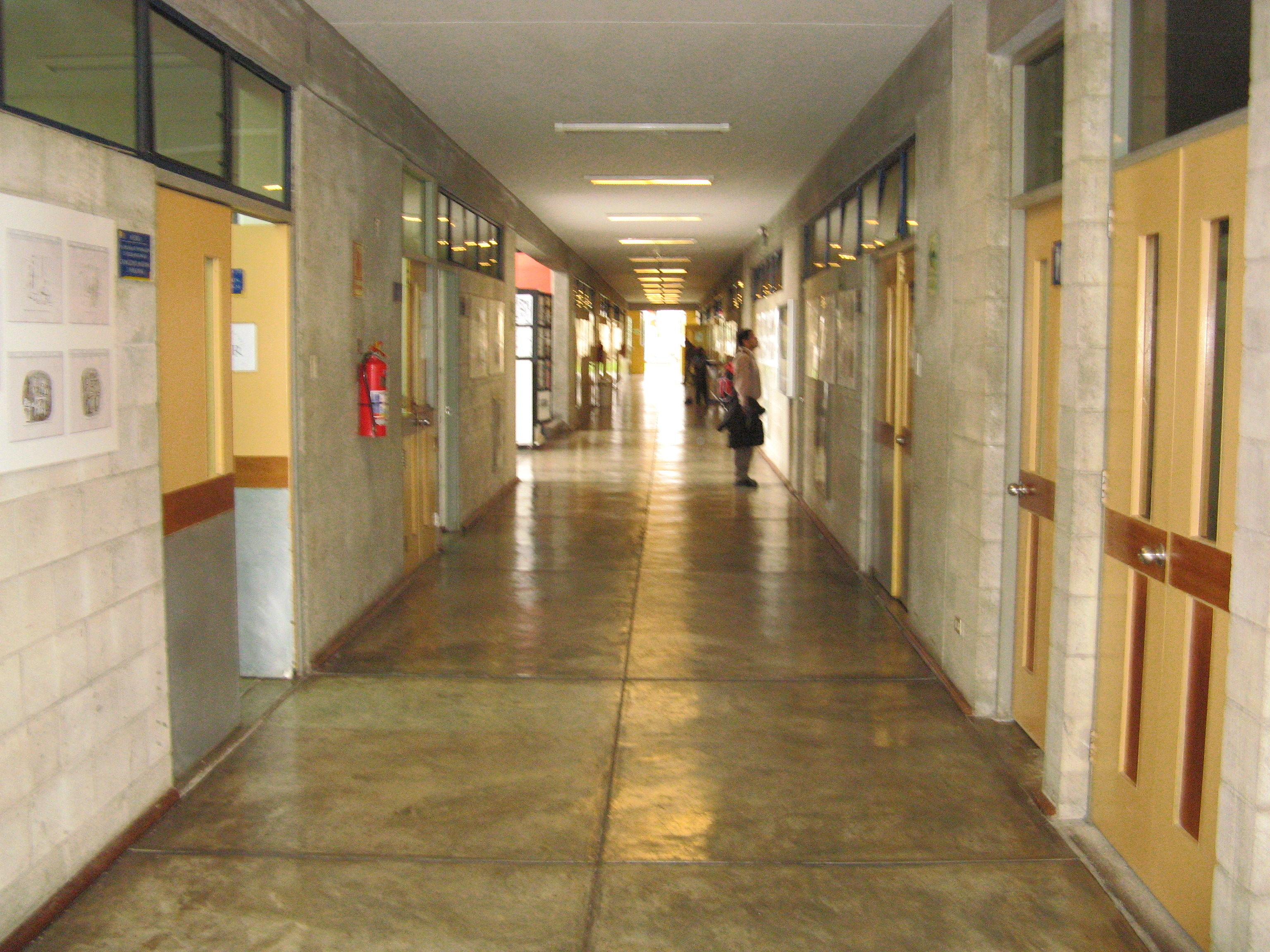 Hall A